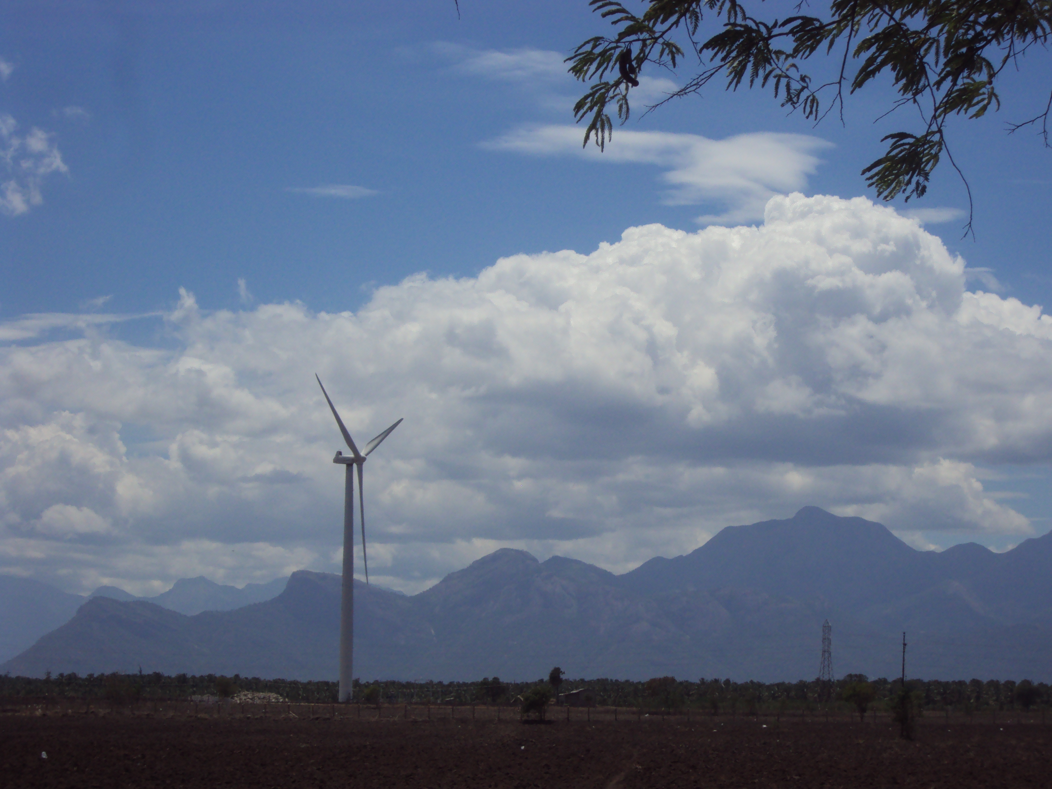 കാറ്റാടിയന്ത്രം